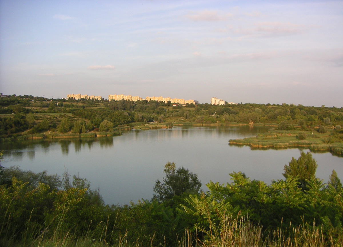 Blick über die Wasserflächen des Wienerberges nach Osten, selbst fotografiert am 26.07.2005, abends, This media shows the natural monument in Vienna with the ID 639.